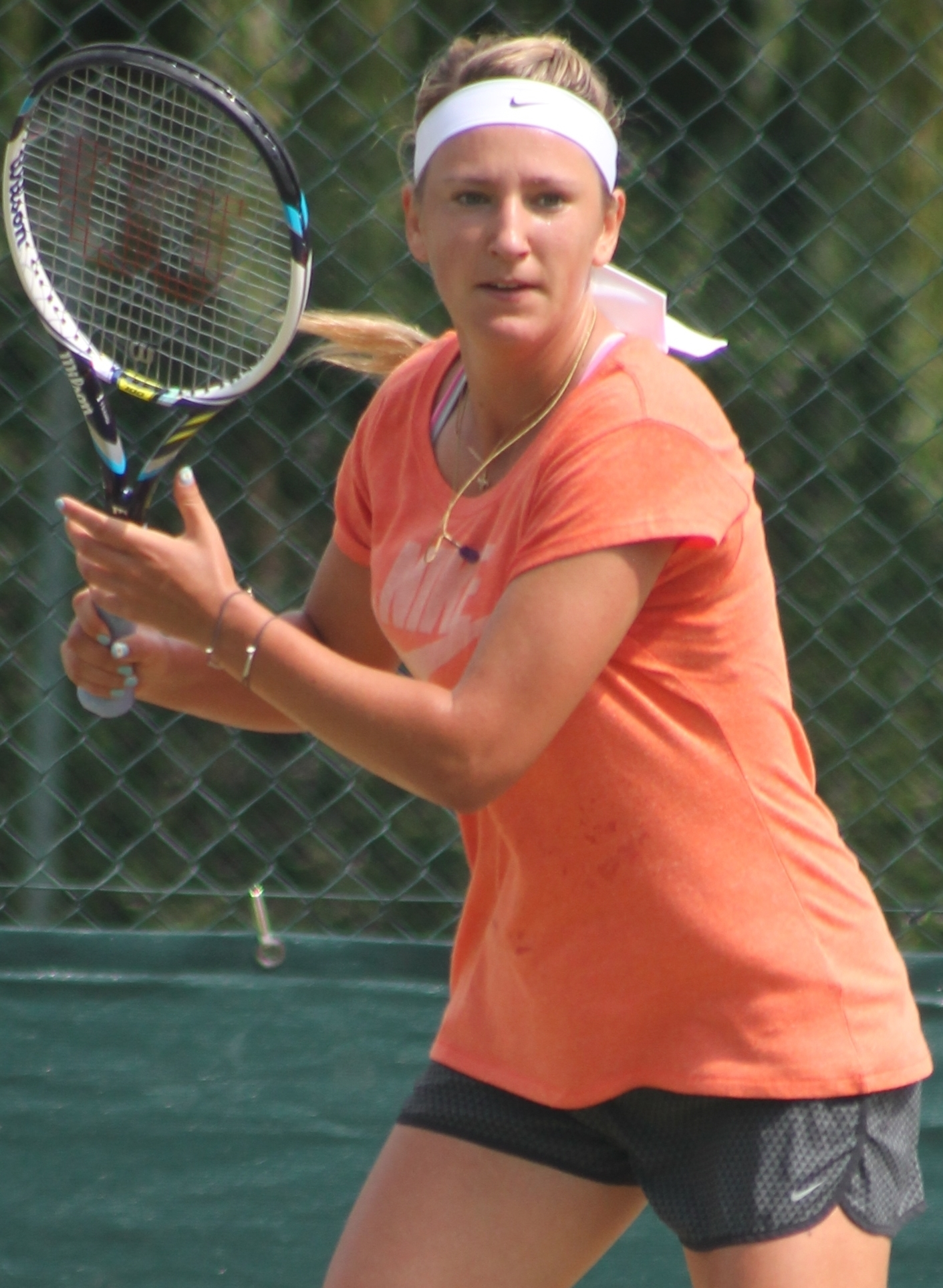 Azarenka WM14 (1)